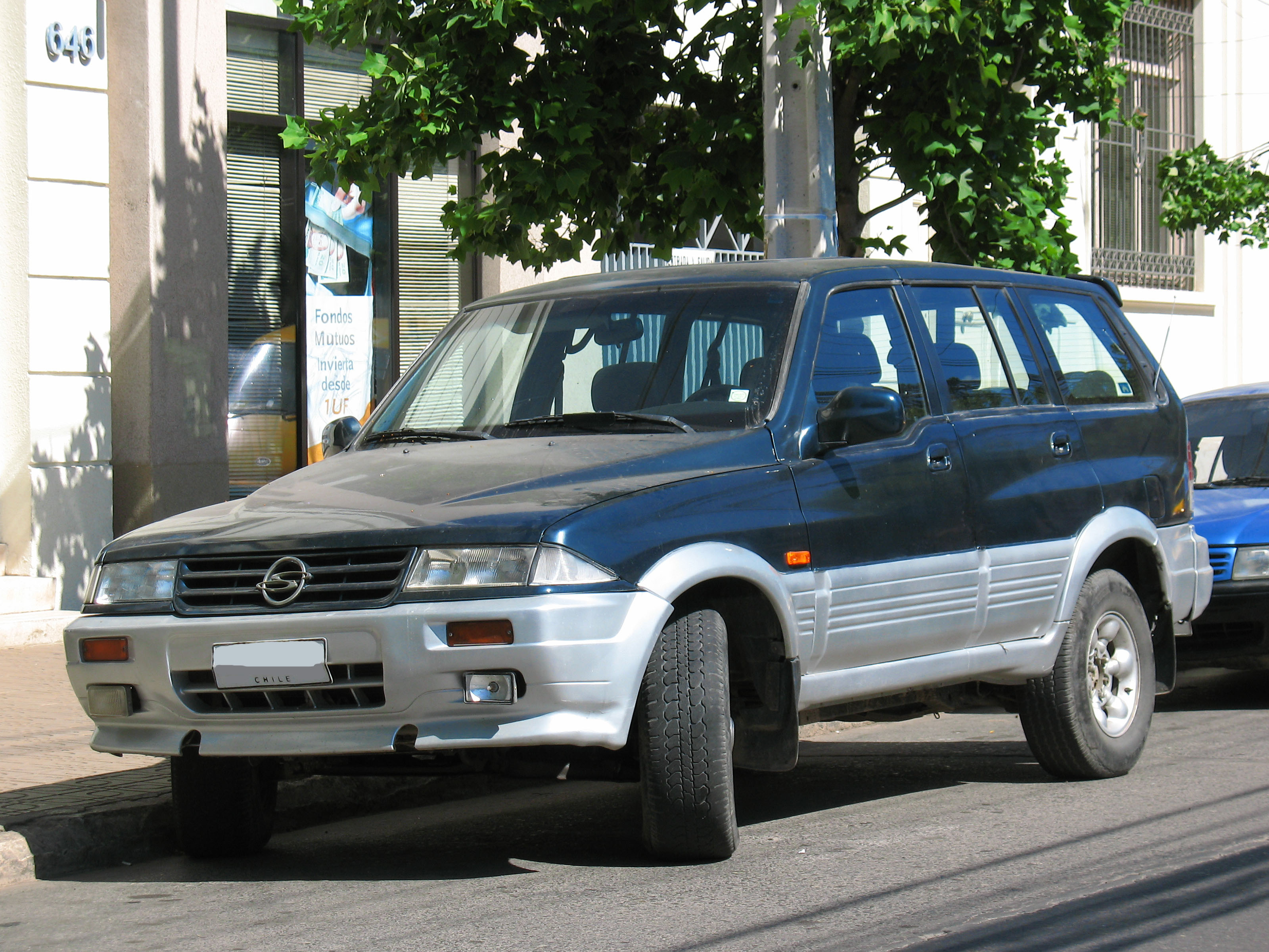 Ssangyong Musso 602EL 2.9d 1997